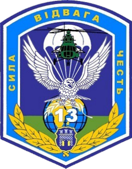 Нарукавний знак, 13 окремий аеромобільний батальйон